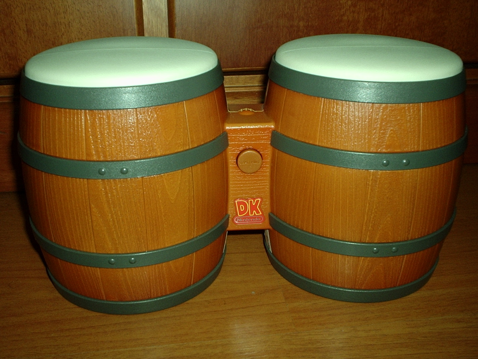 O acessório DK Bongos do Gamecube no chão.